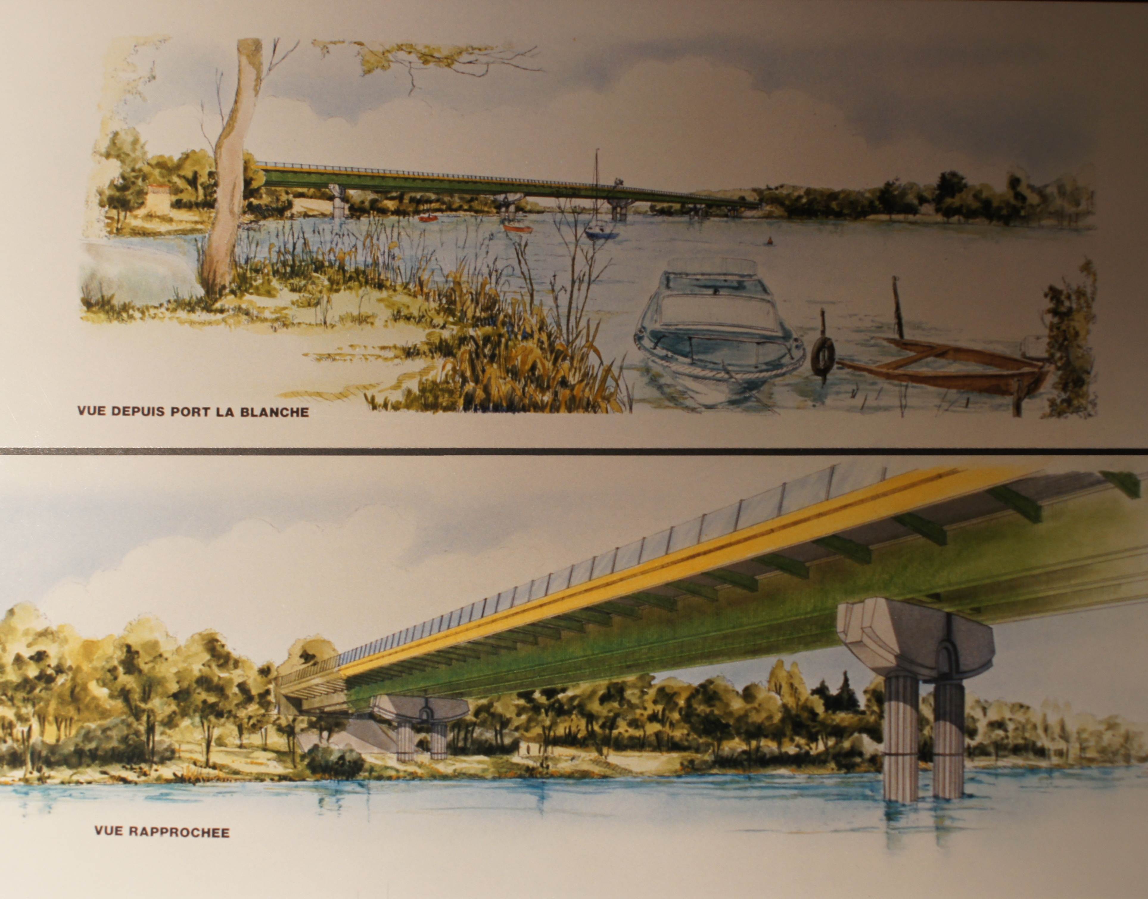 Dessin